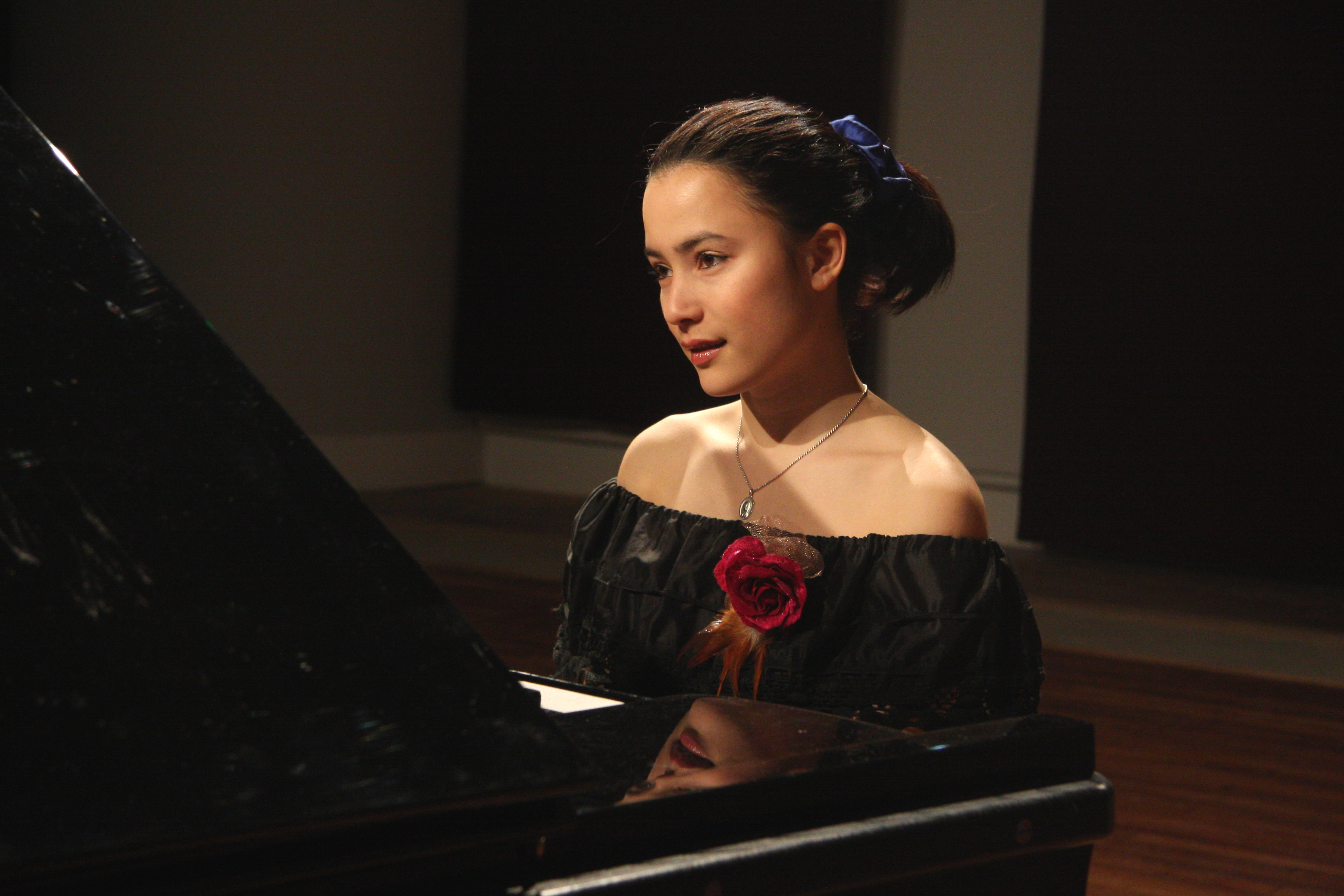 Photo de Lydie Solomon prise par Yvon Marciano à la Salle Colonne le 28 mars 2011